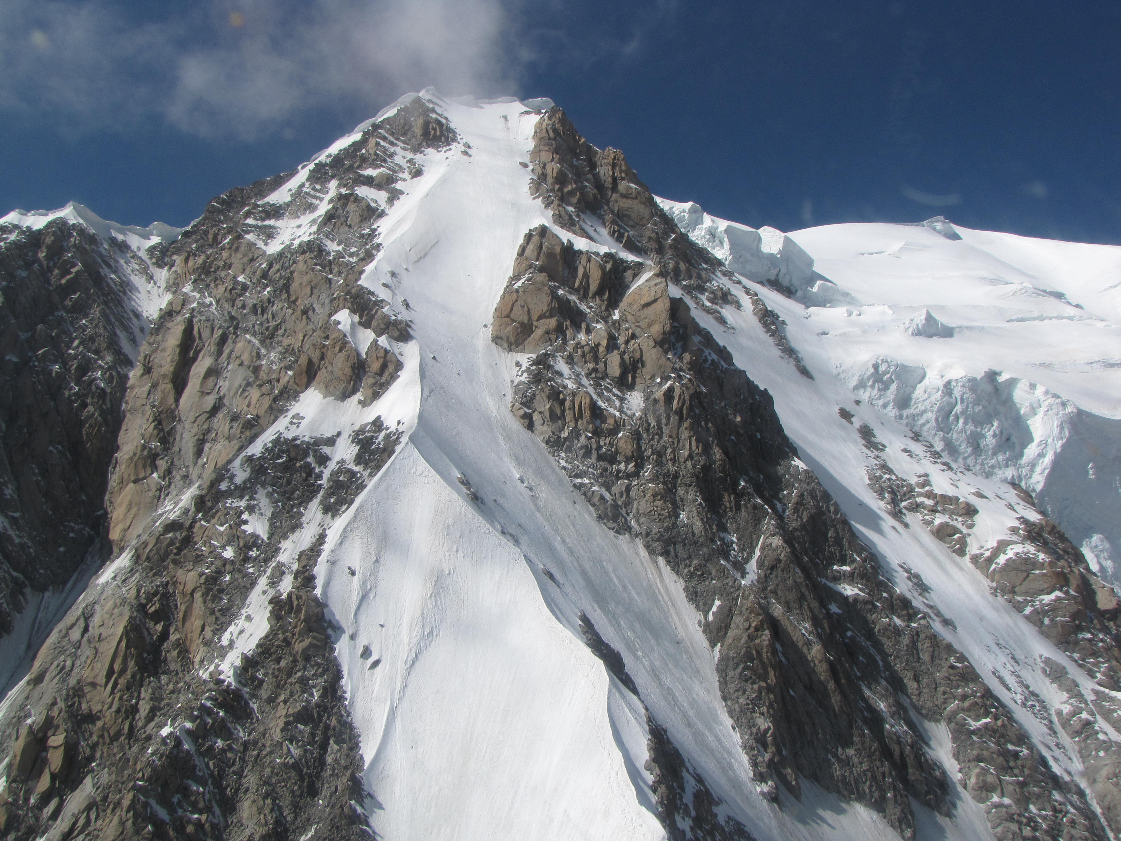 Mont Blanc de Courmayeur - Peuterey ridge